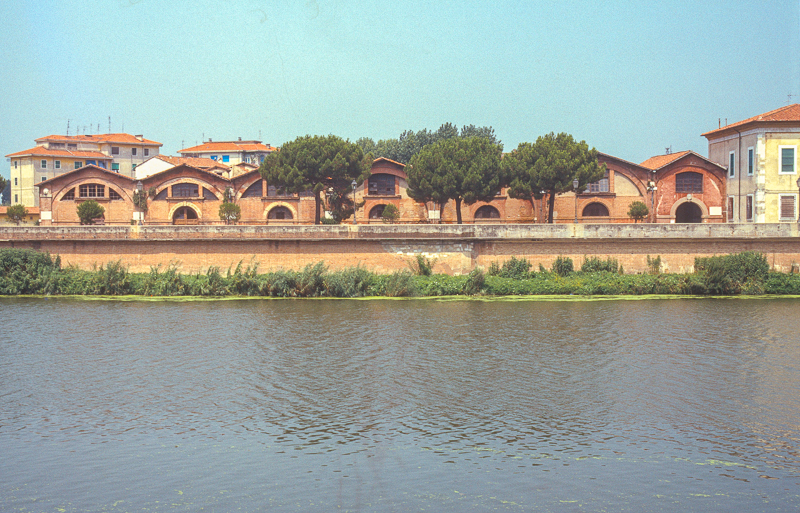 Arsenali Medicei (Buontalenti, 1546) sede del futuro museo delle navi antiche, Pisa - Italia.